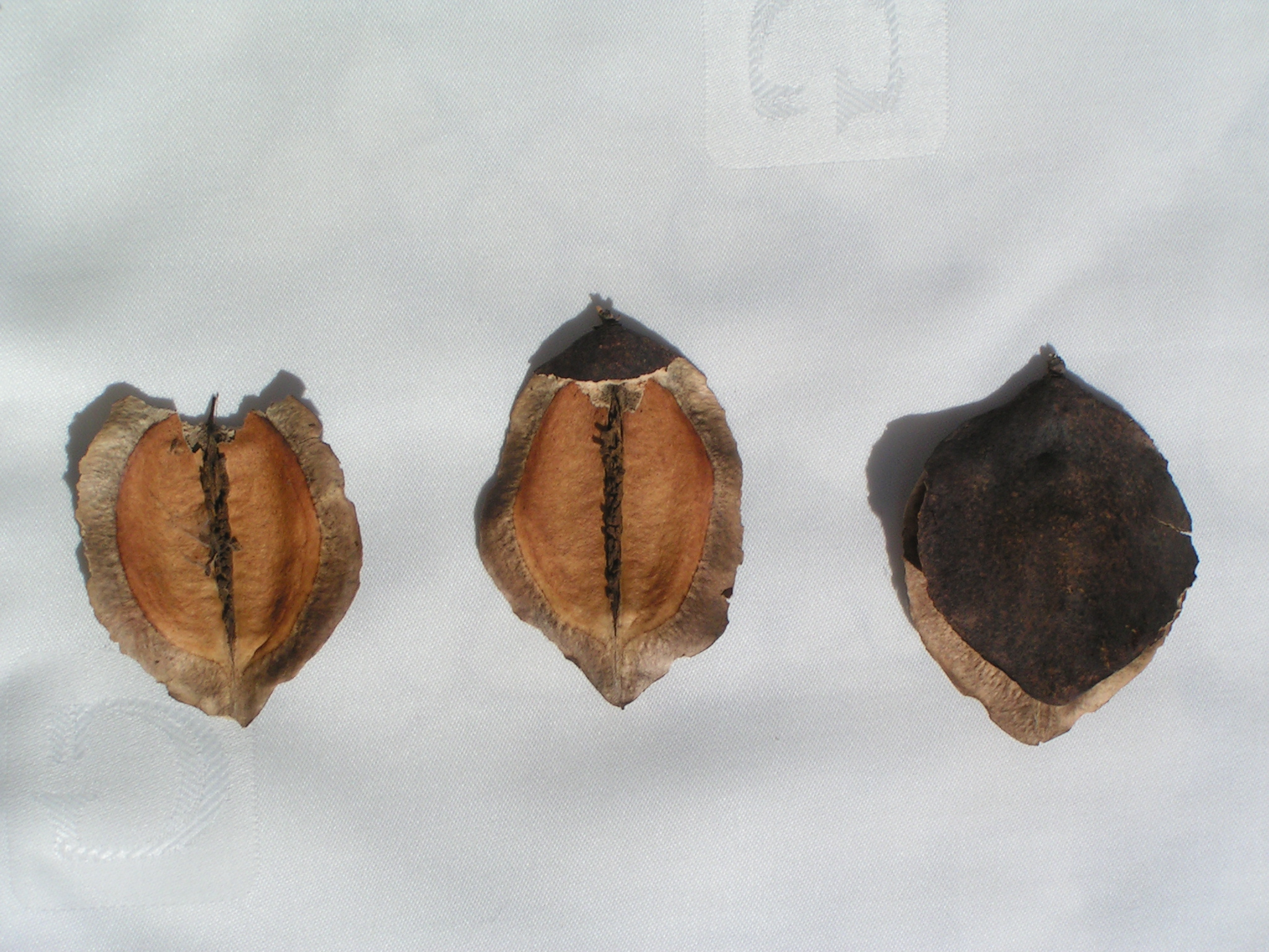 Frutos abiertos y cerrados de jacarandá (Jacaranda mimosifolia)